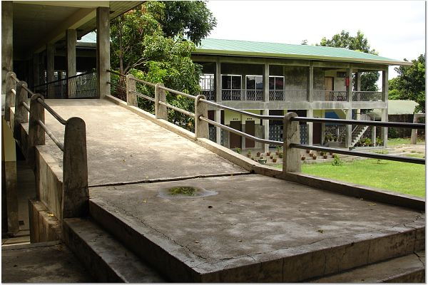 back campus